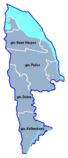 Locator maps for communes in województwo zachodniopomorskie : Zpl gminy.jpg (podział na gminy)